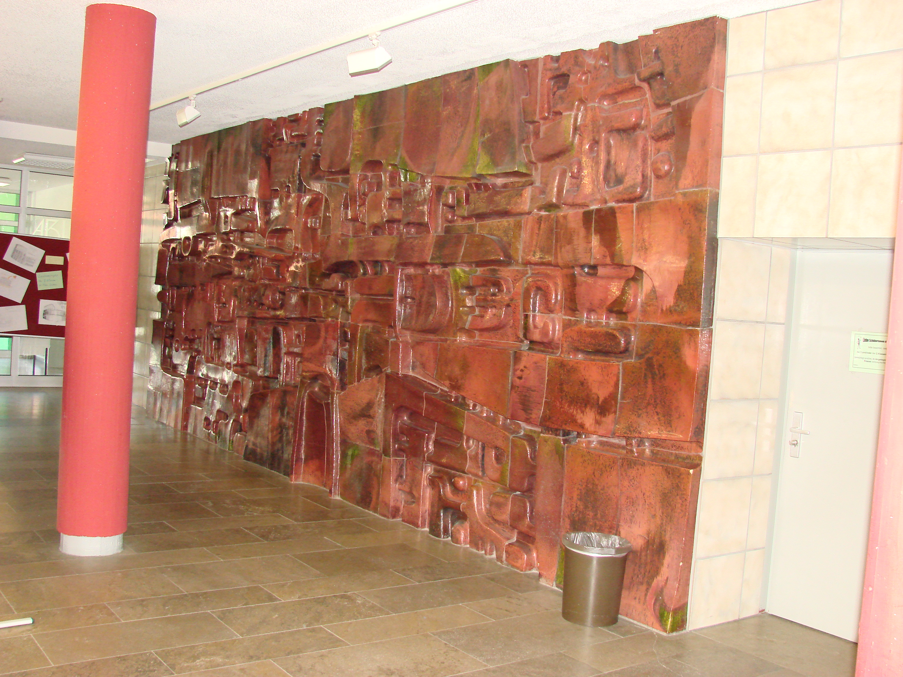 Wandrelief im Foyer des Herzog-Christian-August-Gymnasiums Sulzbach-Rosenberg im Juli 2012